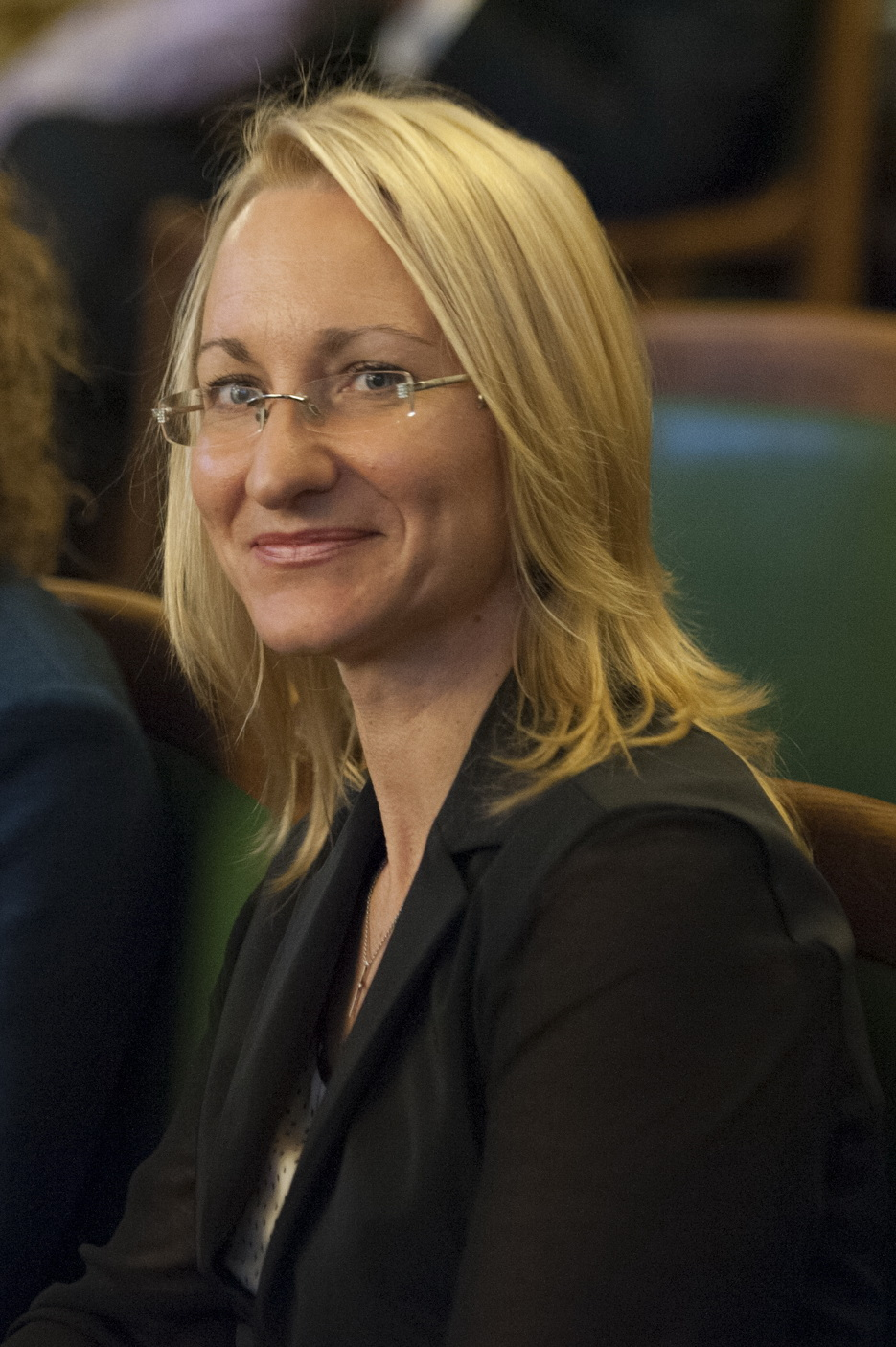 Dace Melbārde